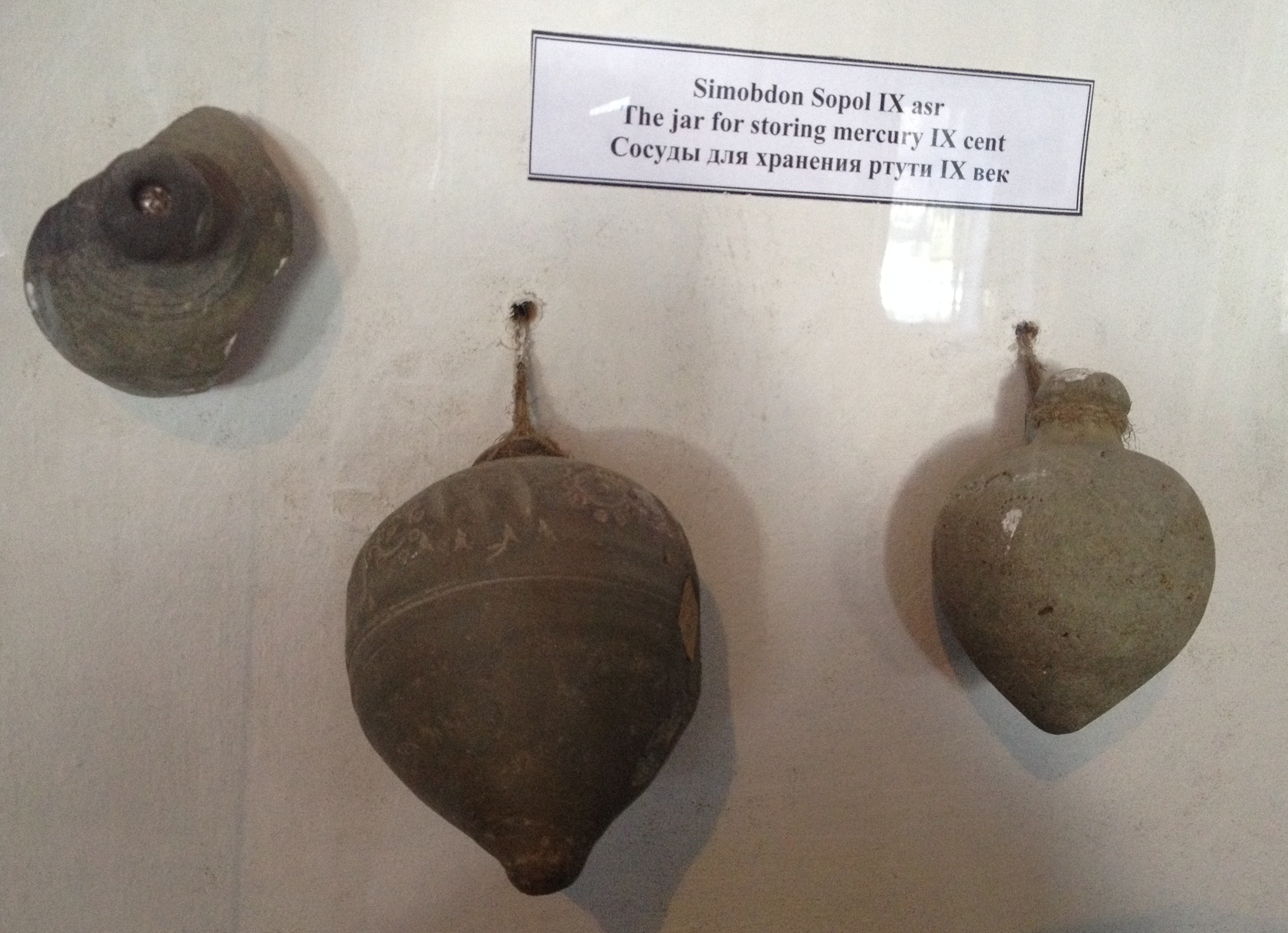 Илакские сосуды для ртути. Экспонат Ангренского краеведческого музея